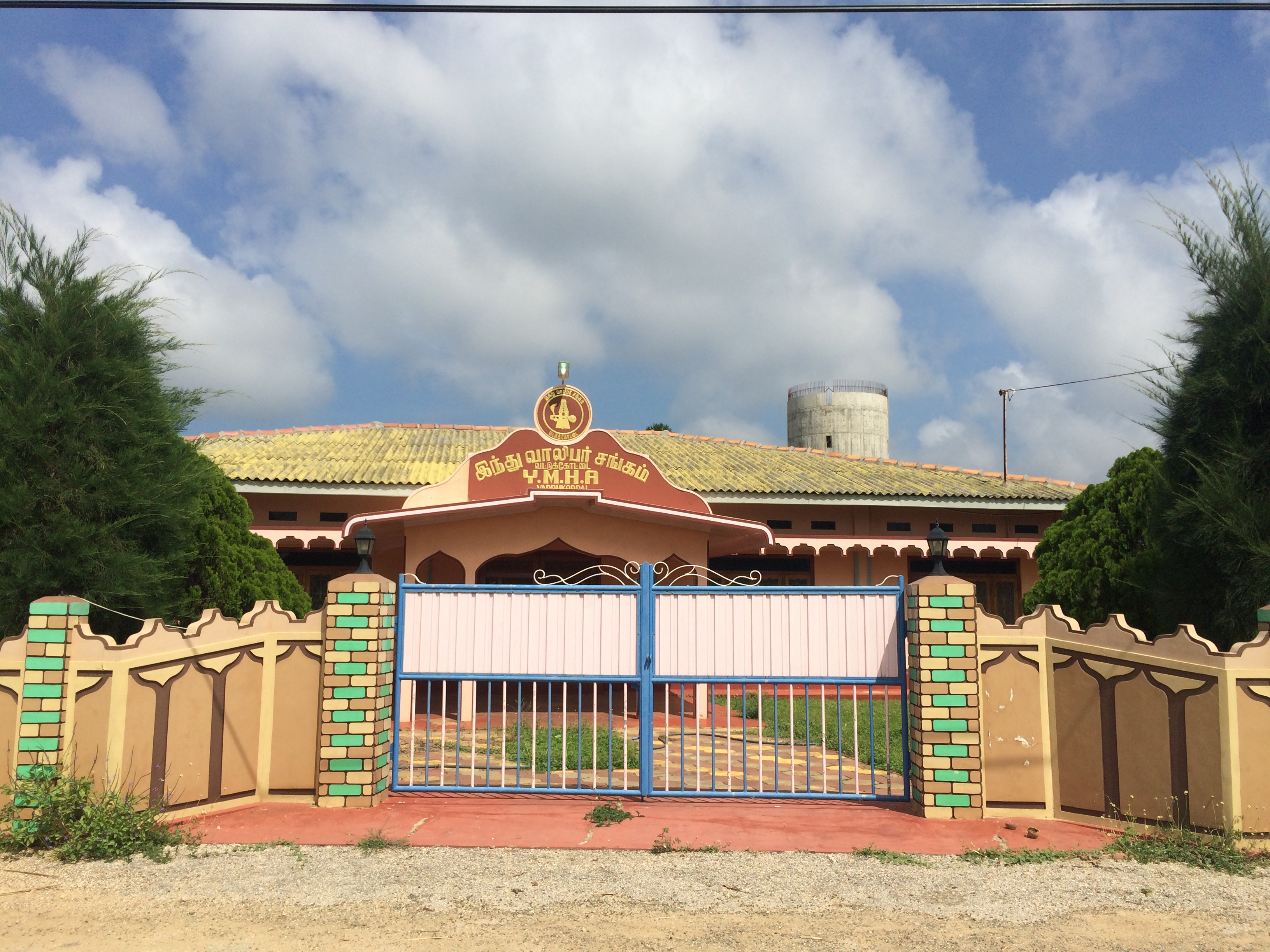 இடம் - சங்கரத்தை